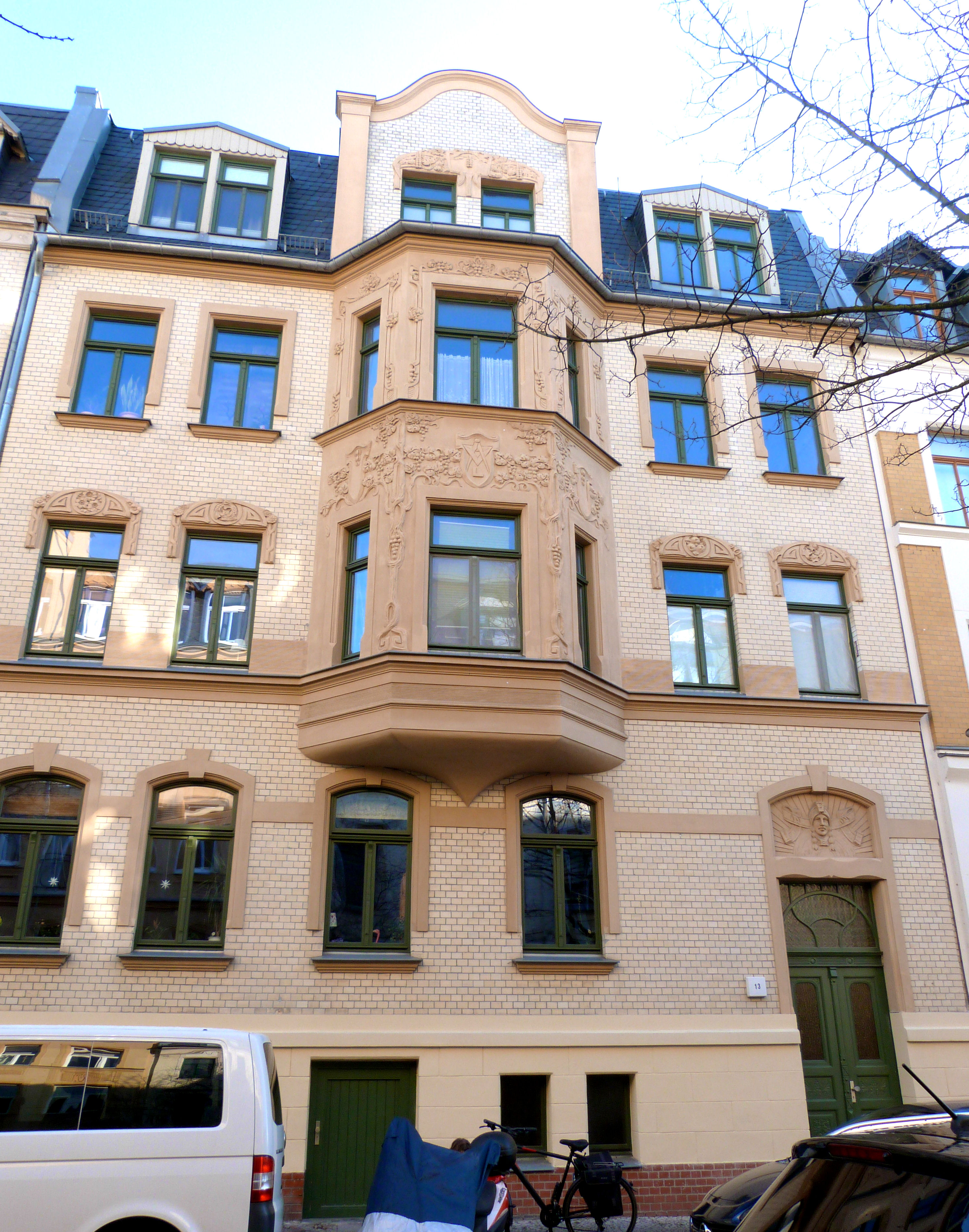 Rudolf-Haym-Straße 13, Halle (Saale)